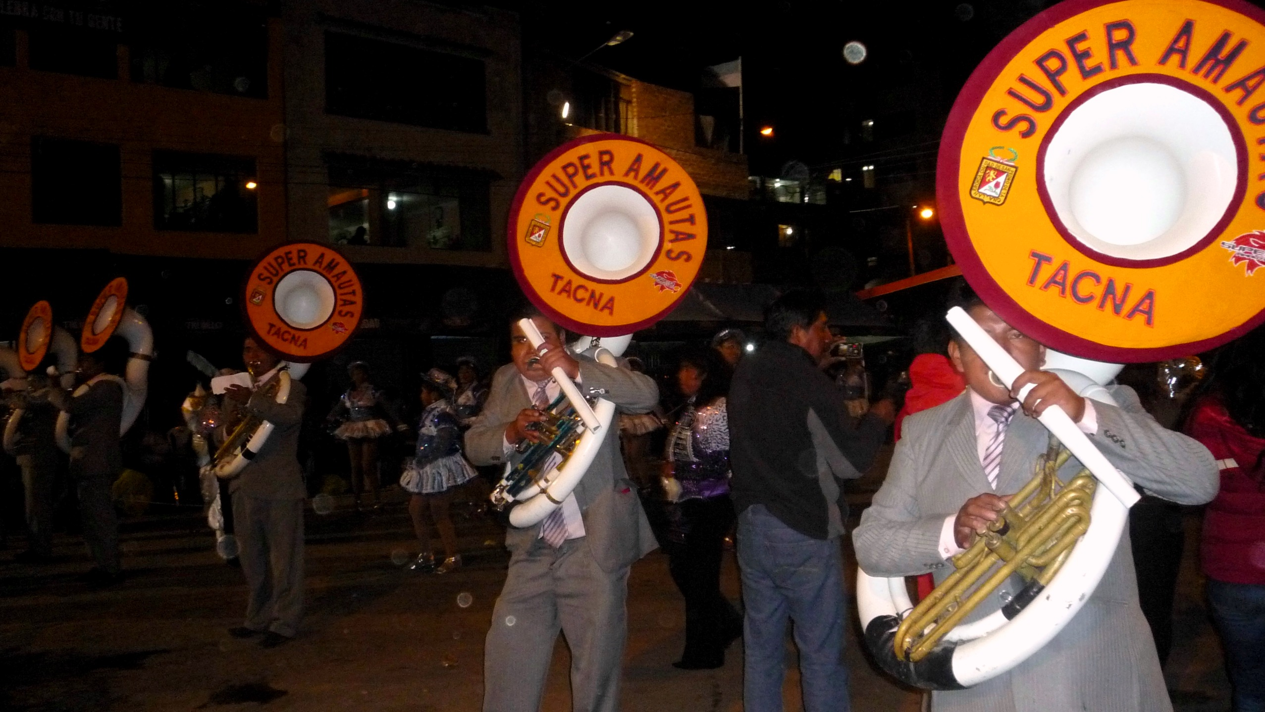 Candelaria Puno 2014